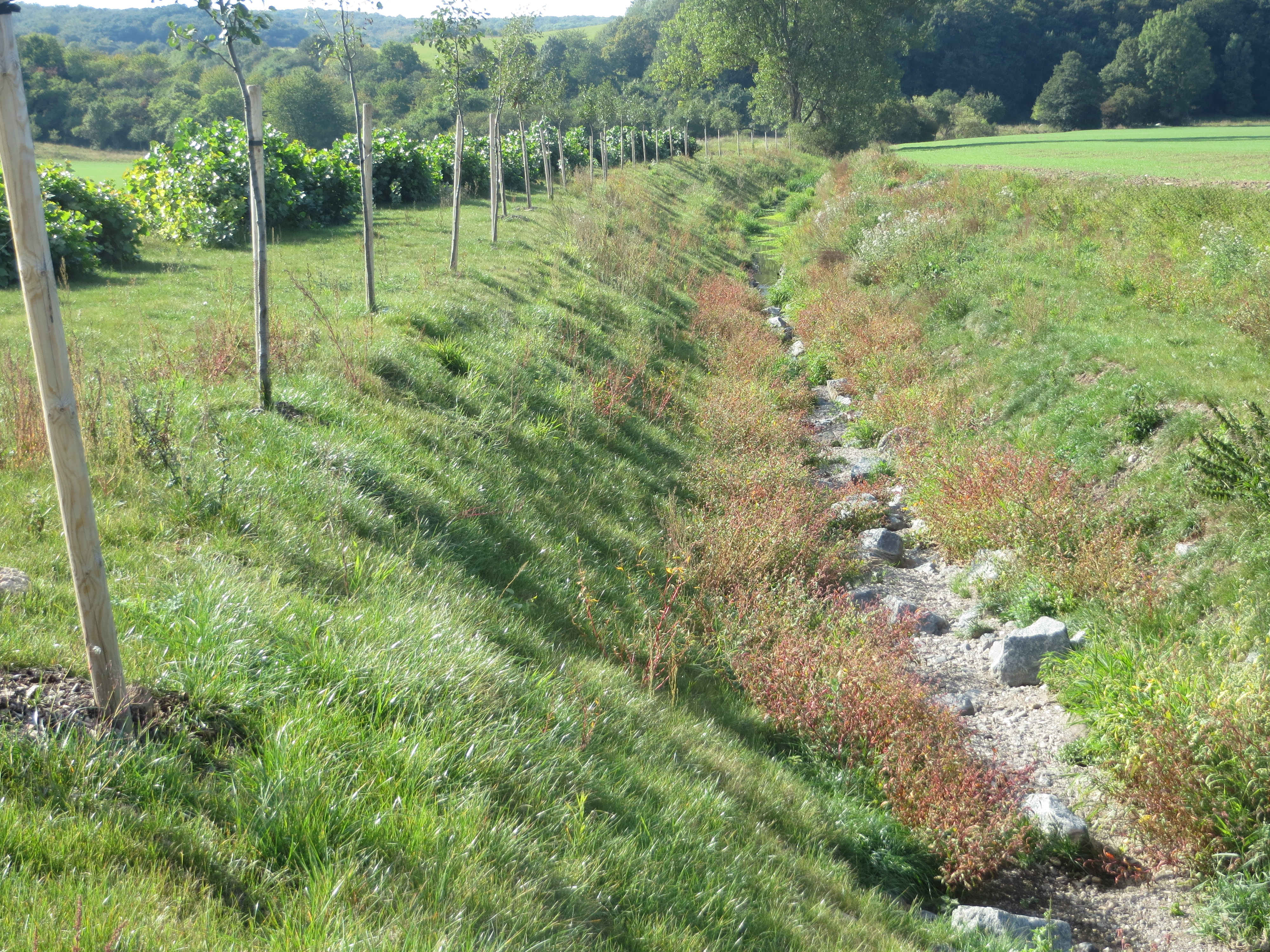 Hungersee – Breitunger Bach, trockener Abschnitt